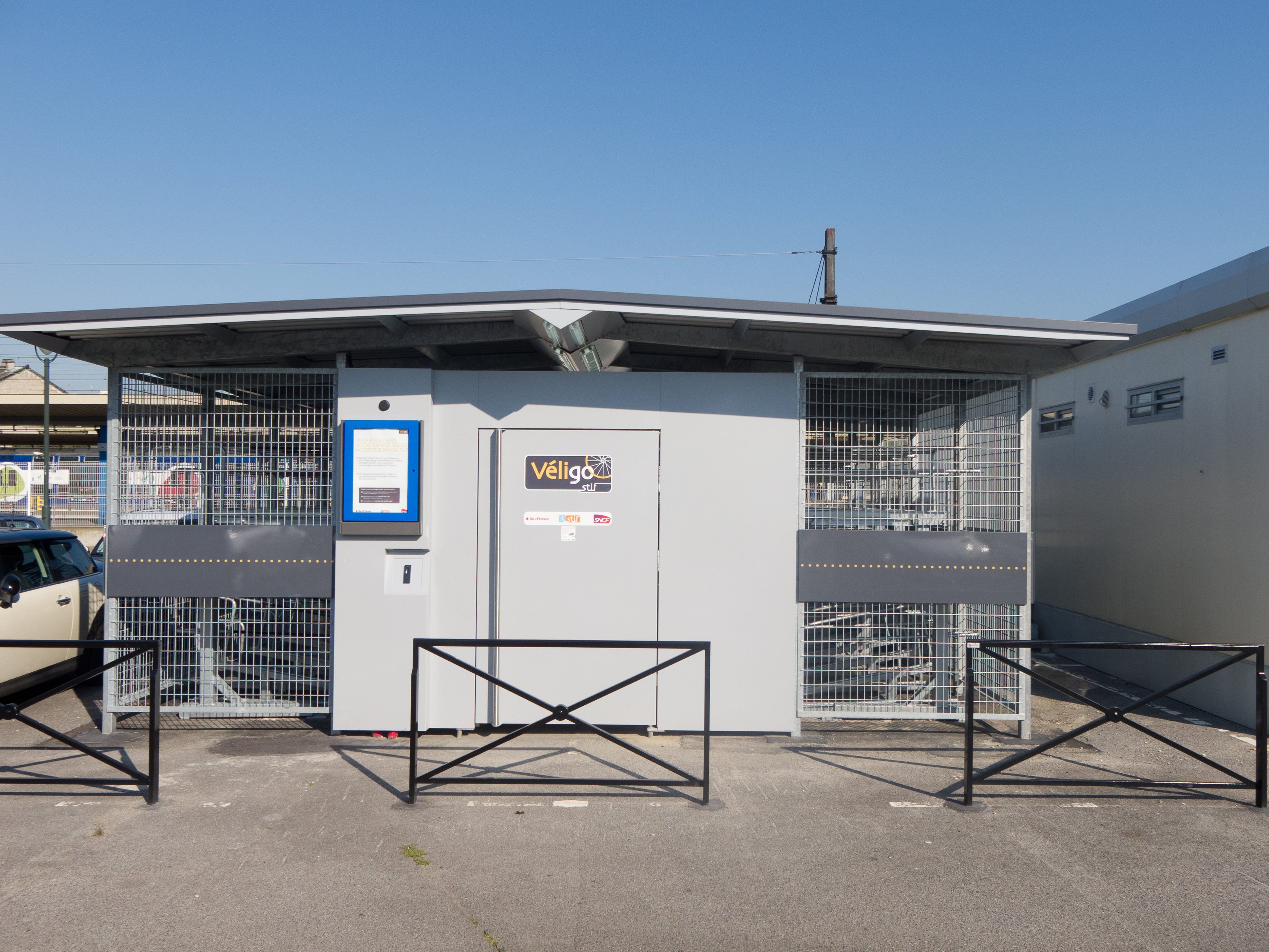 L'abri à vélo Véligo de la gare de Corbeil-Essonnes, Corbeil-Essonnes, Essonne, France.